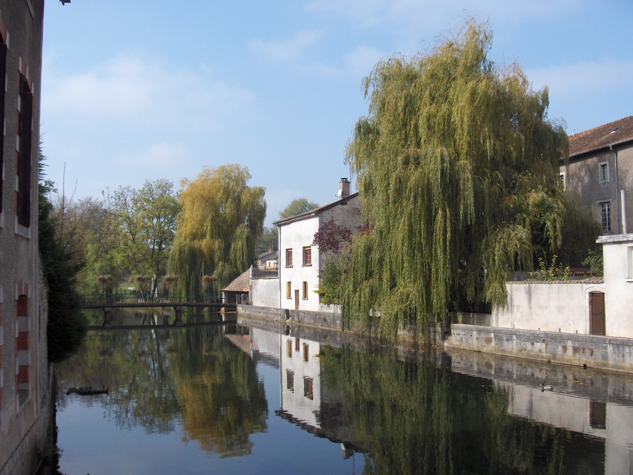 L'Ornain à Gondrecourt-le-Château (Meuse, France)